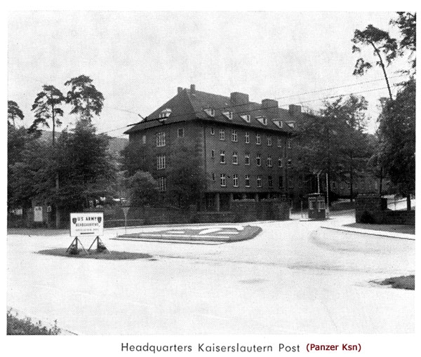 Panzer-Kaserne